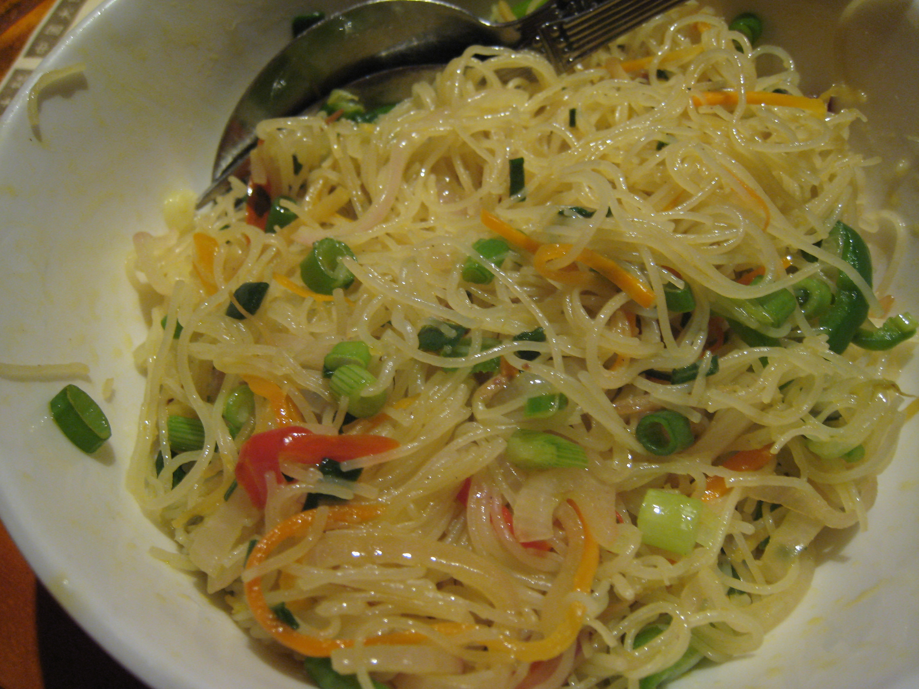 Singapore style noodles